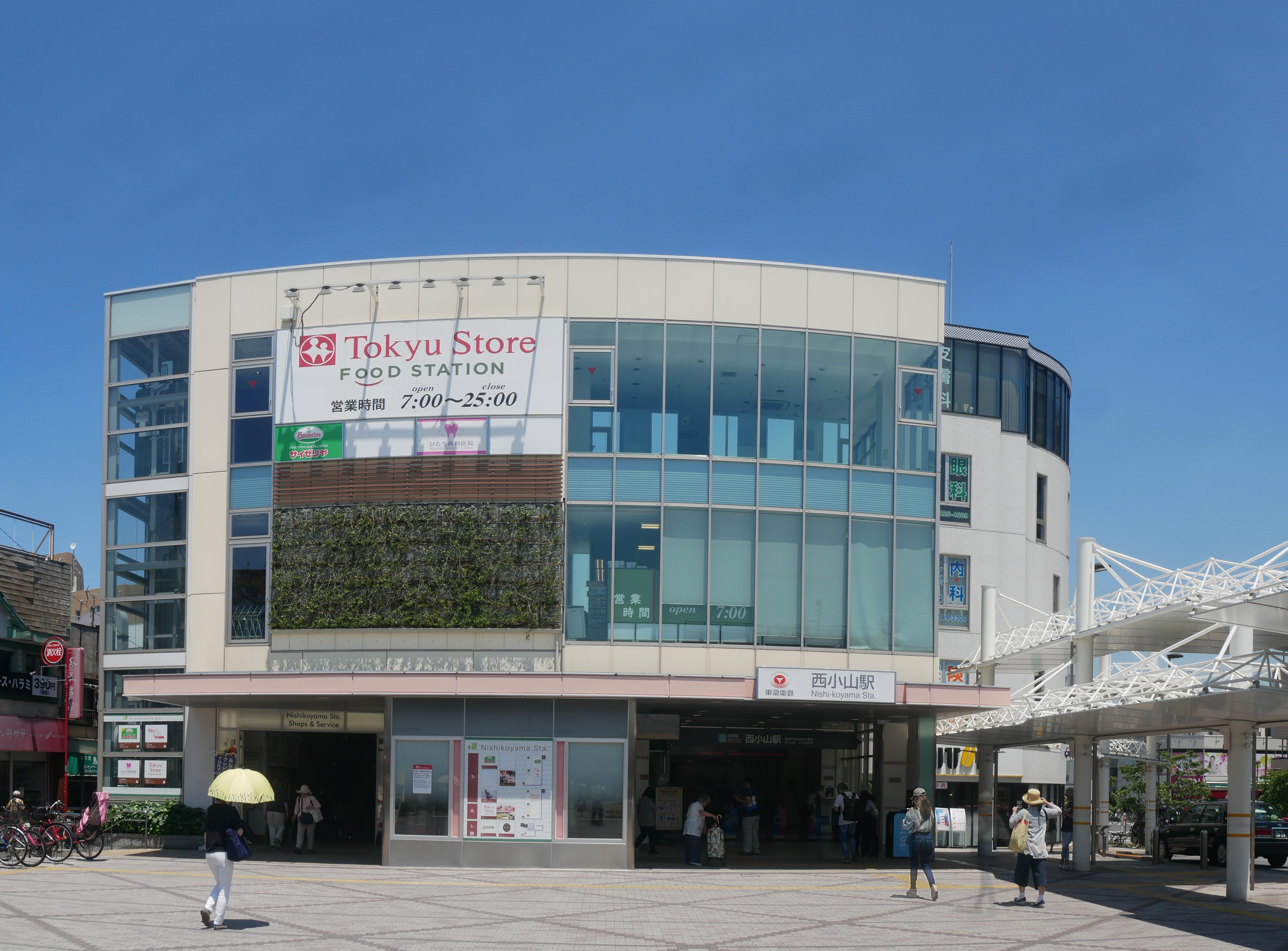 西小山駅 (Nishi-Koyama Station)